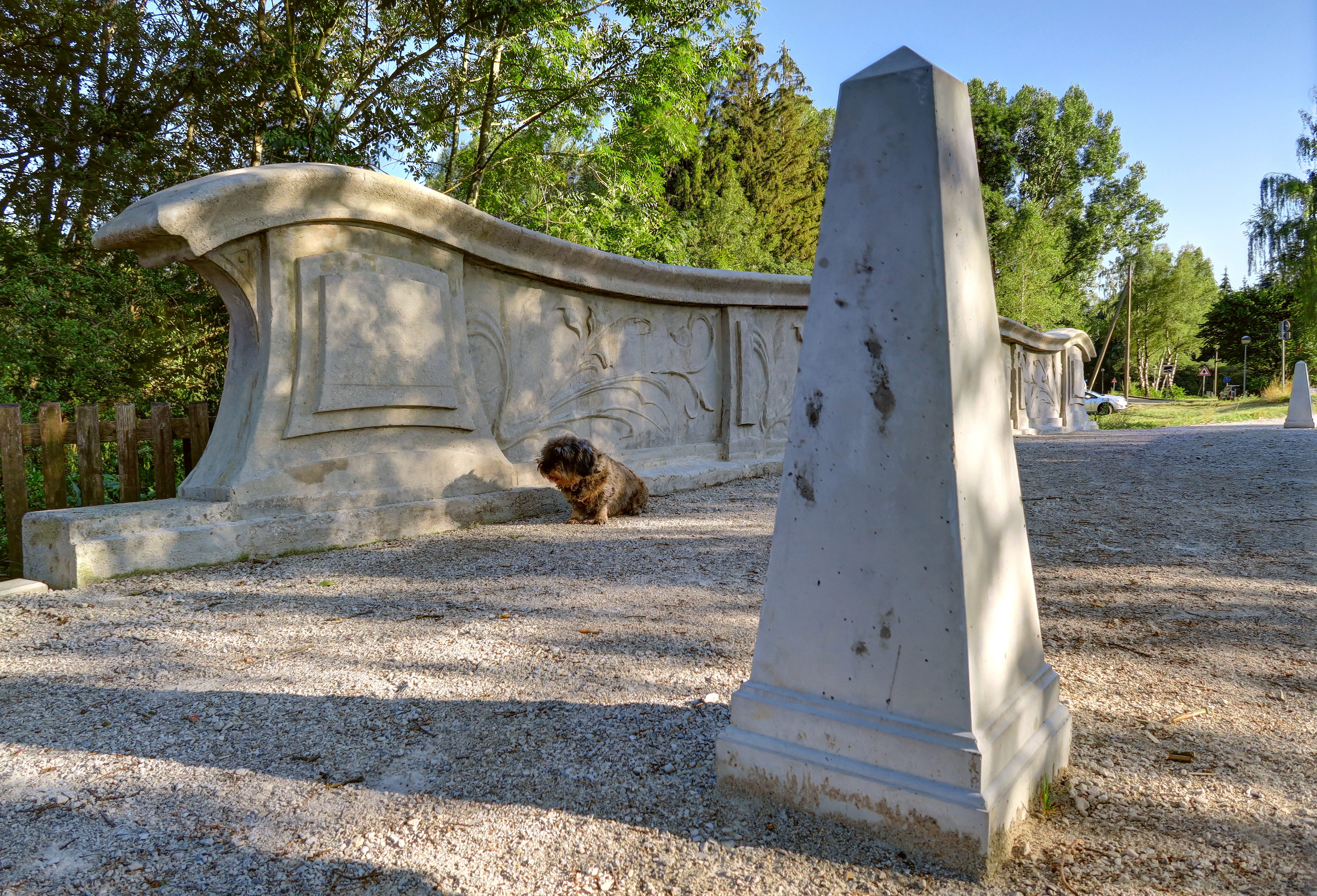 Deutschland, Bayern, Oberbayern, Landkreis Fürstenfeldbruck, Gemeinde Gröbenzell, die 1916 und 2014 restaurierte Russenbrücke an der Zillerhofstraße